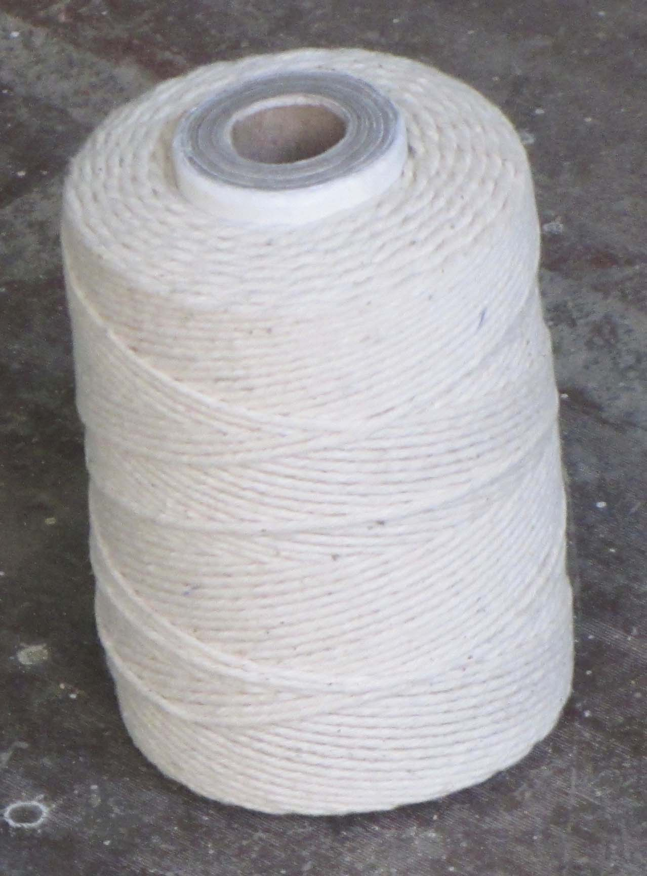 உலண்டு, நூலை அதன் சுற்று பிரியாமல் இகுக்கவேண்டி அதனைச் சுற்றும் முறை. own shot.